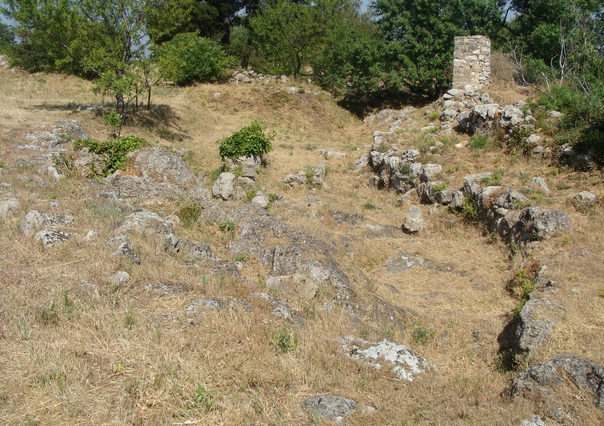 Vestiges des habitations du village celto-ligure du Baou de Saint-Marcel (Marseille, 11e arr.)